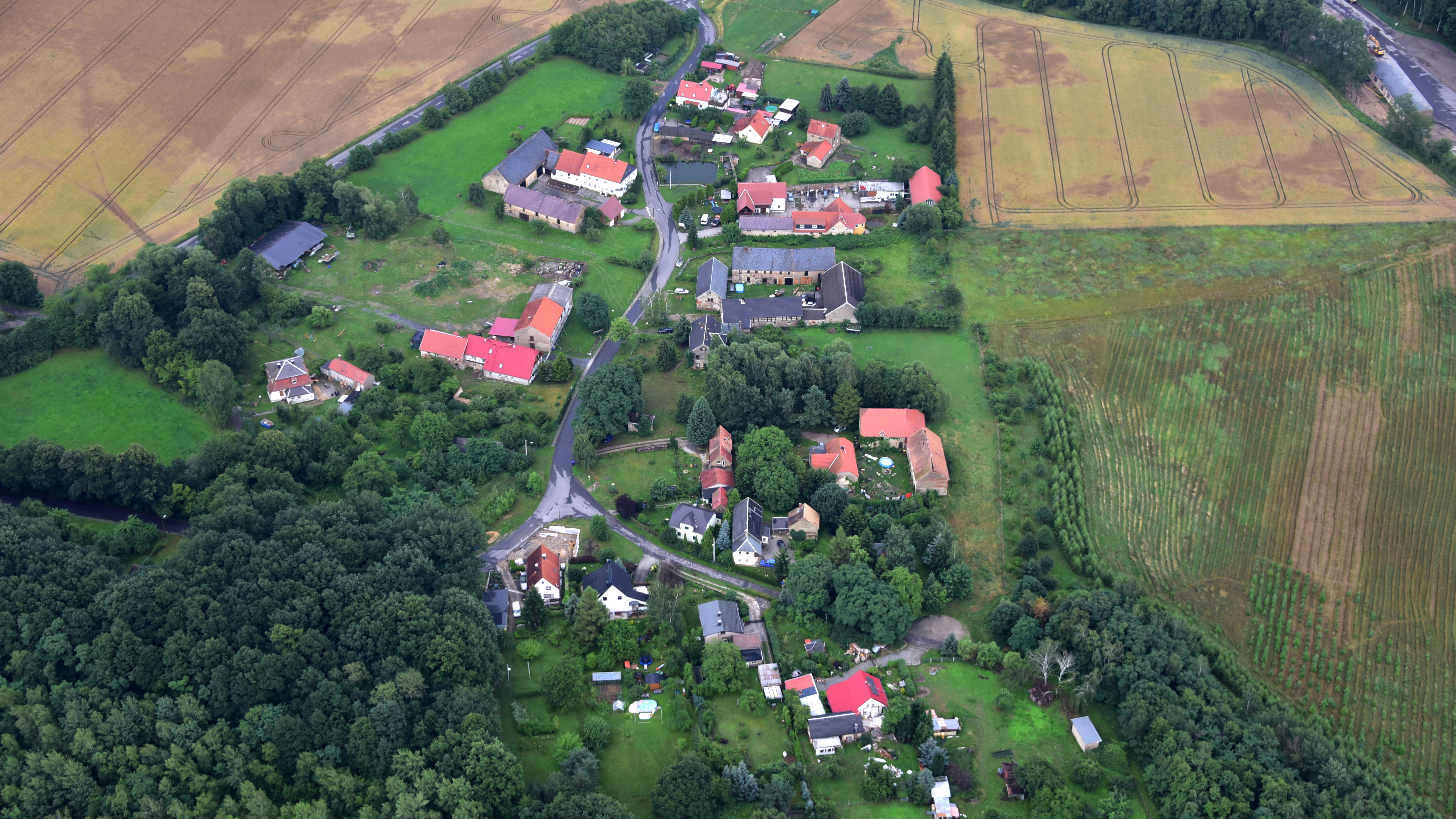 Wetro, Luftaufnahme (2017) Hornjoserbsce: Powětrowy wobraz Wětrowa (2017)